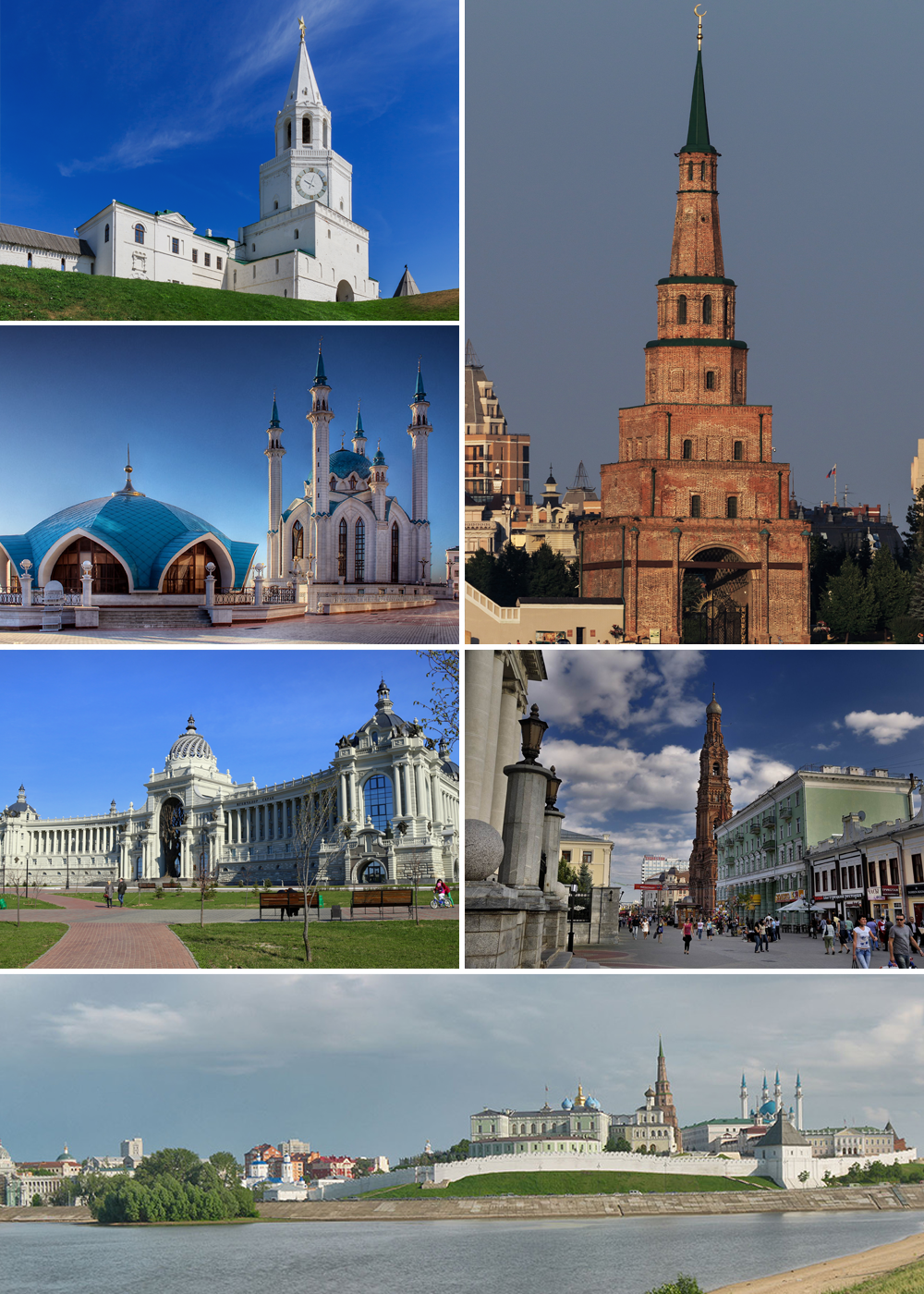 Коллаж для статьи о Казани